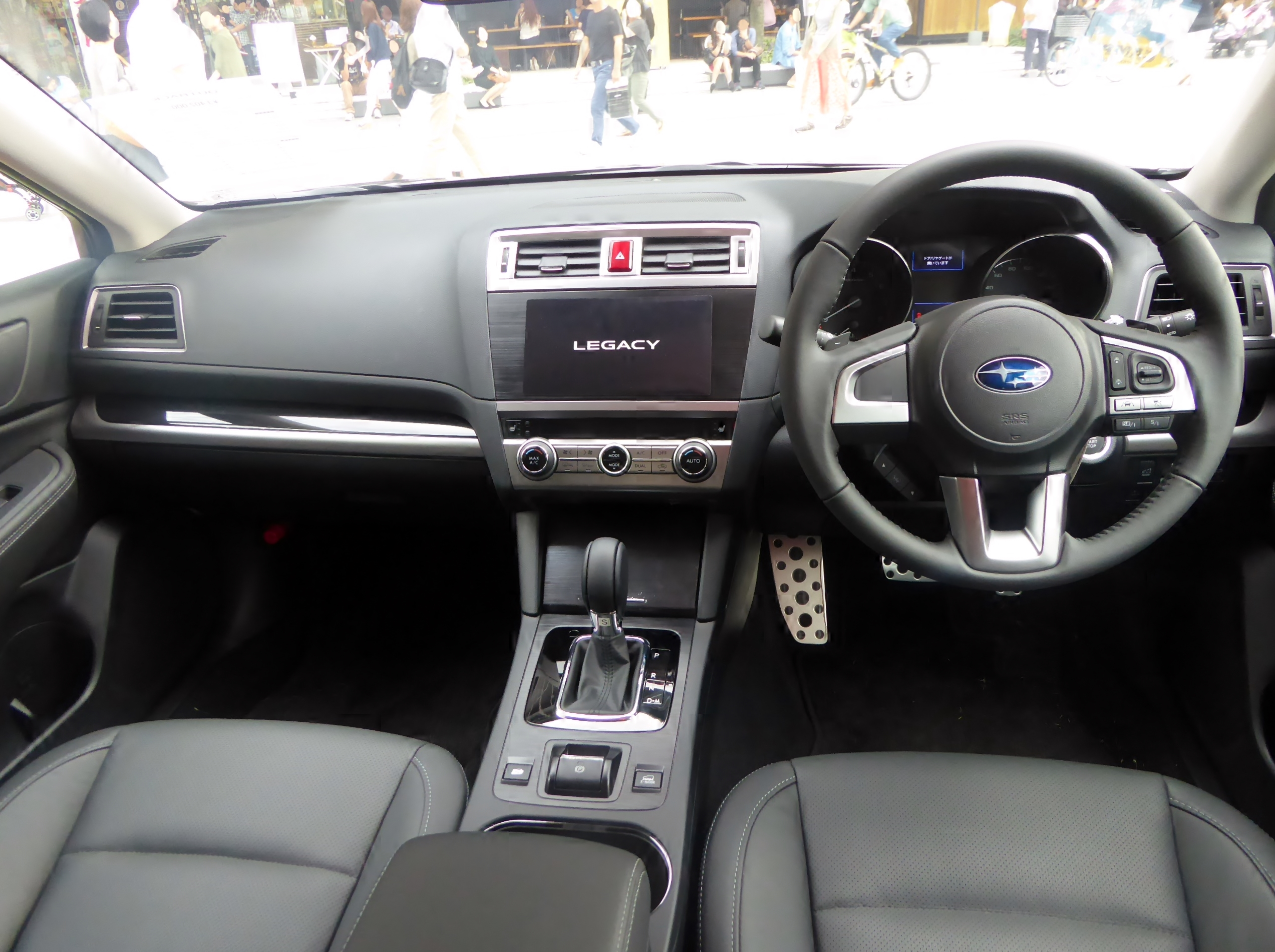 BS型スバル・レガシィアウトバックLimitedのインテリアを撮影。